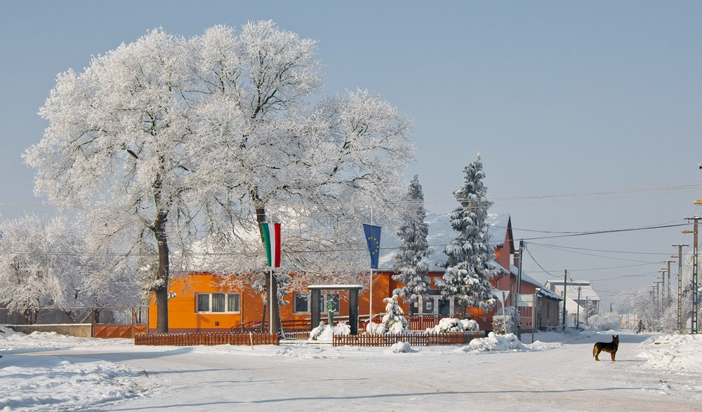 Csány télen